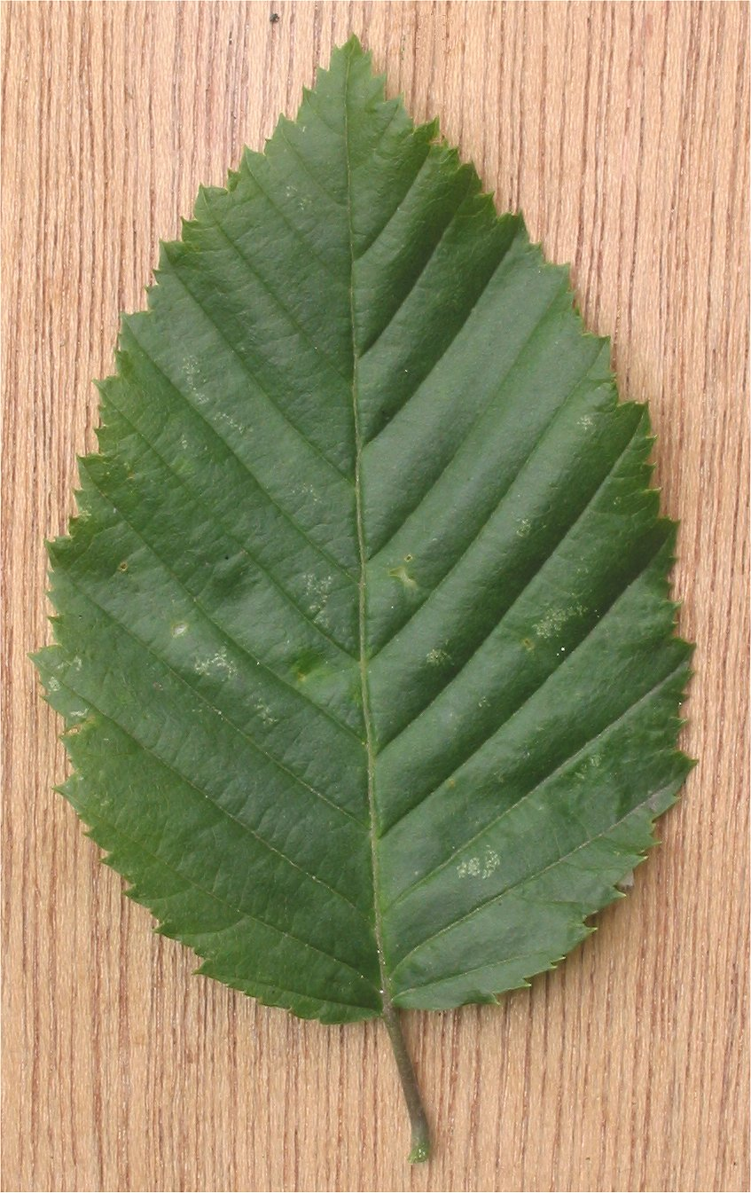 (nl: Haagbeuk dubbelgezaagd blad) Carpinus betulus leaf